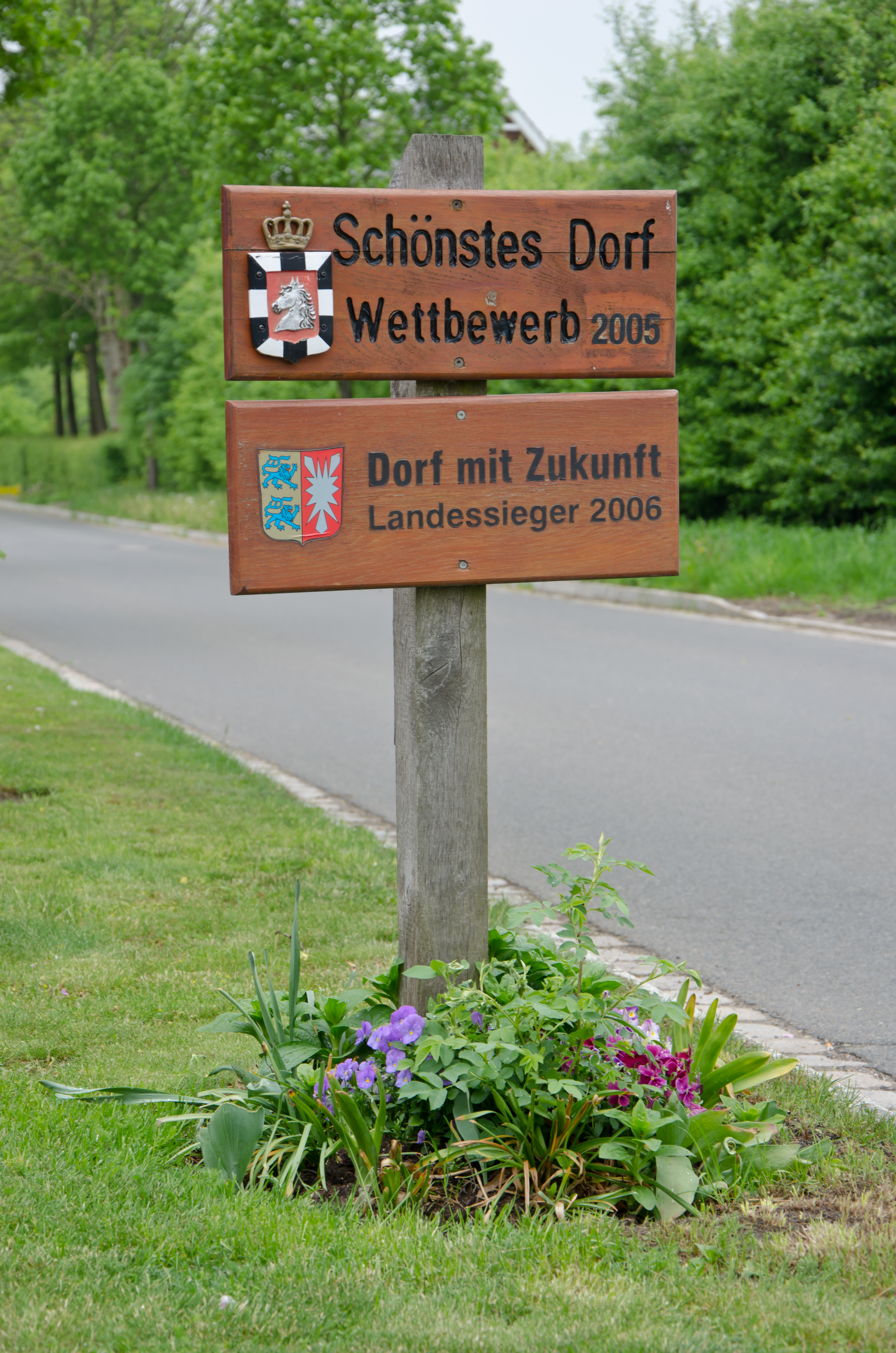 Duvensee Schild mit den Auszeichnungen "Schönstes Dorf"- Wettbewerb 2005 "Dorf mit Zukunft" Landessieger 2005